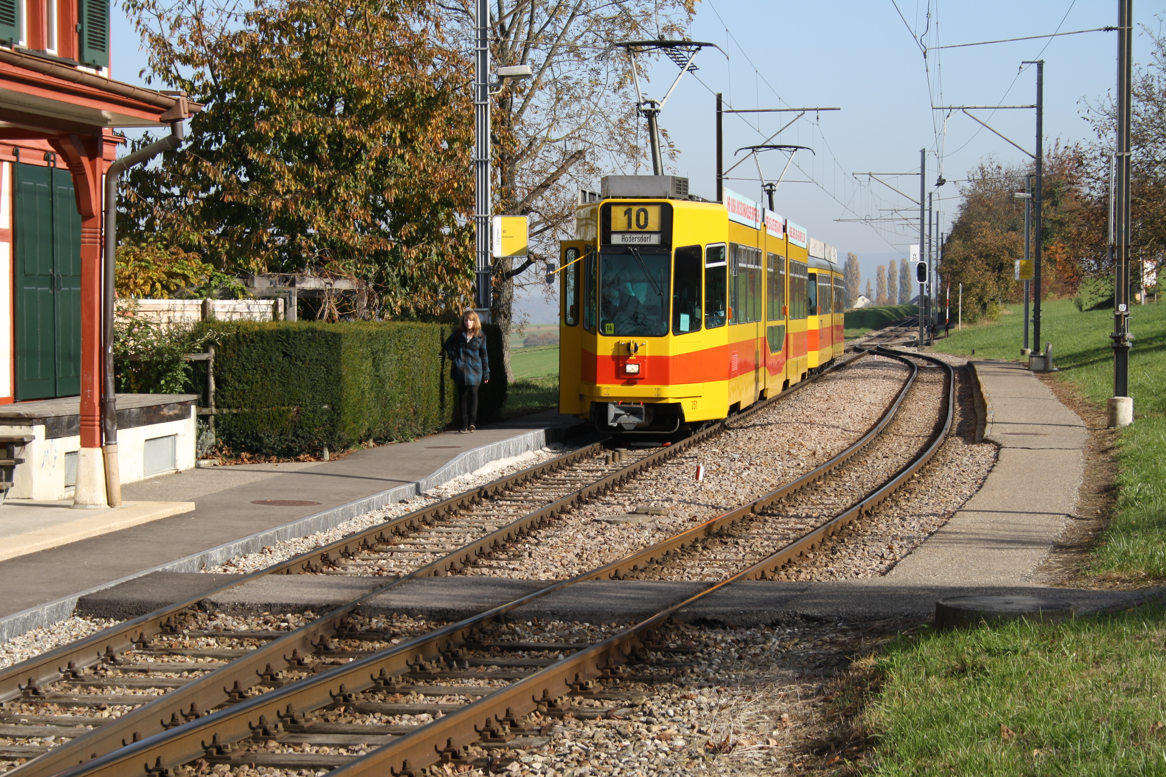 BLT Be 4/8 mit motorisiertem Anhänger Be 4/6 (Bj.1972) in Leymen